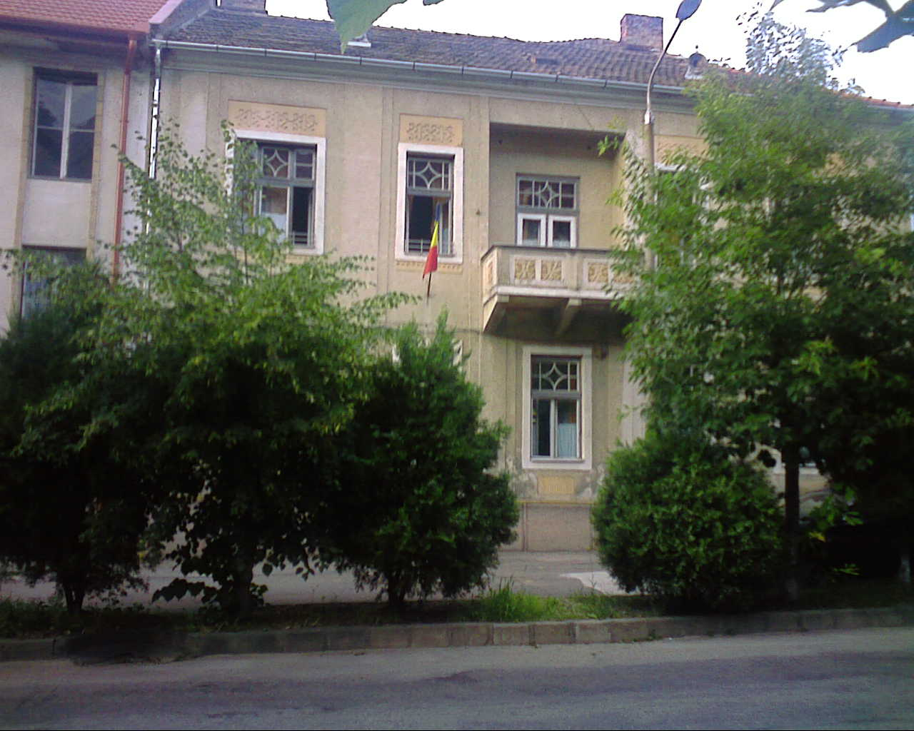 Casă pe Strada Corneliu Coposu din Zalău